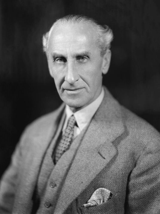 Lord lytton